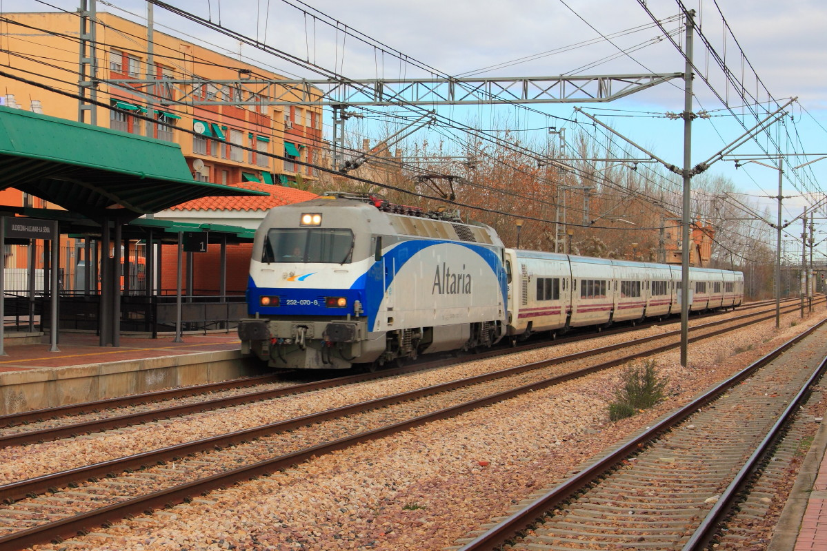 La locomotora eléctrica 252.070 de Renfe Operadora, con un servicio Talgo Barcelona Sants-Alacant Terminal, cruzando la estación de Ulldecona - Alcanar - La Sénia (Montsià, Tarragona, Catalunya).